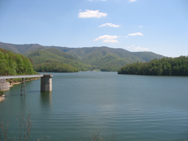 Watauga Lake viewed from Watauga Dam.